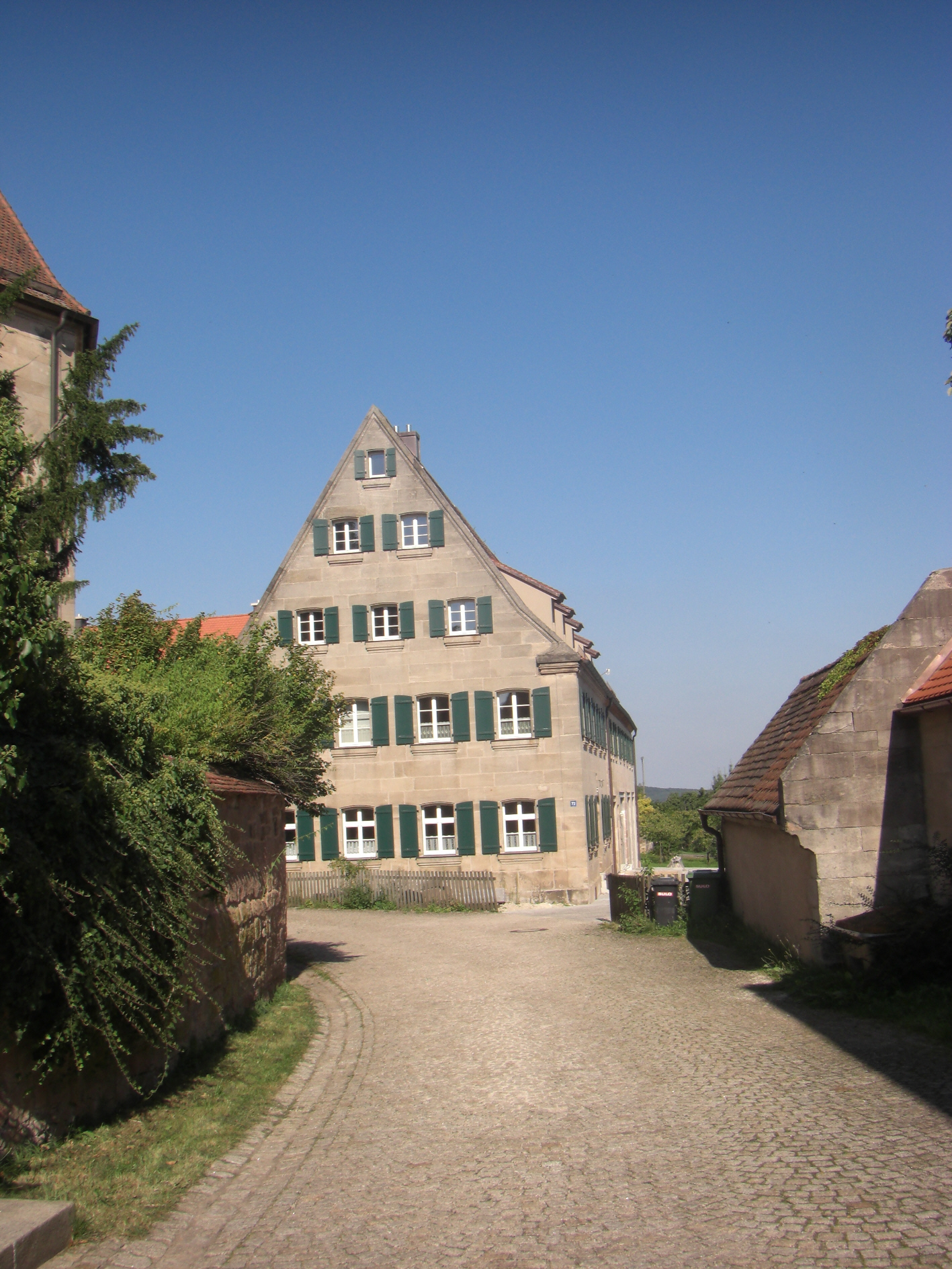 Bauernhaus (ehemalige Brauerei) in Kalbensteinberg, 1879 neu erbaut - Neben der Rieterkirche (bis 1753 im Besitz der Rieter von Kornburg und Kalbensteinberg)